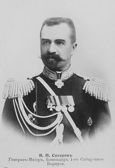 генерал-майор Сахаров Владимир Викторович (1853—1920)